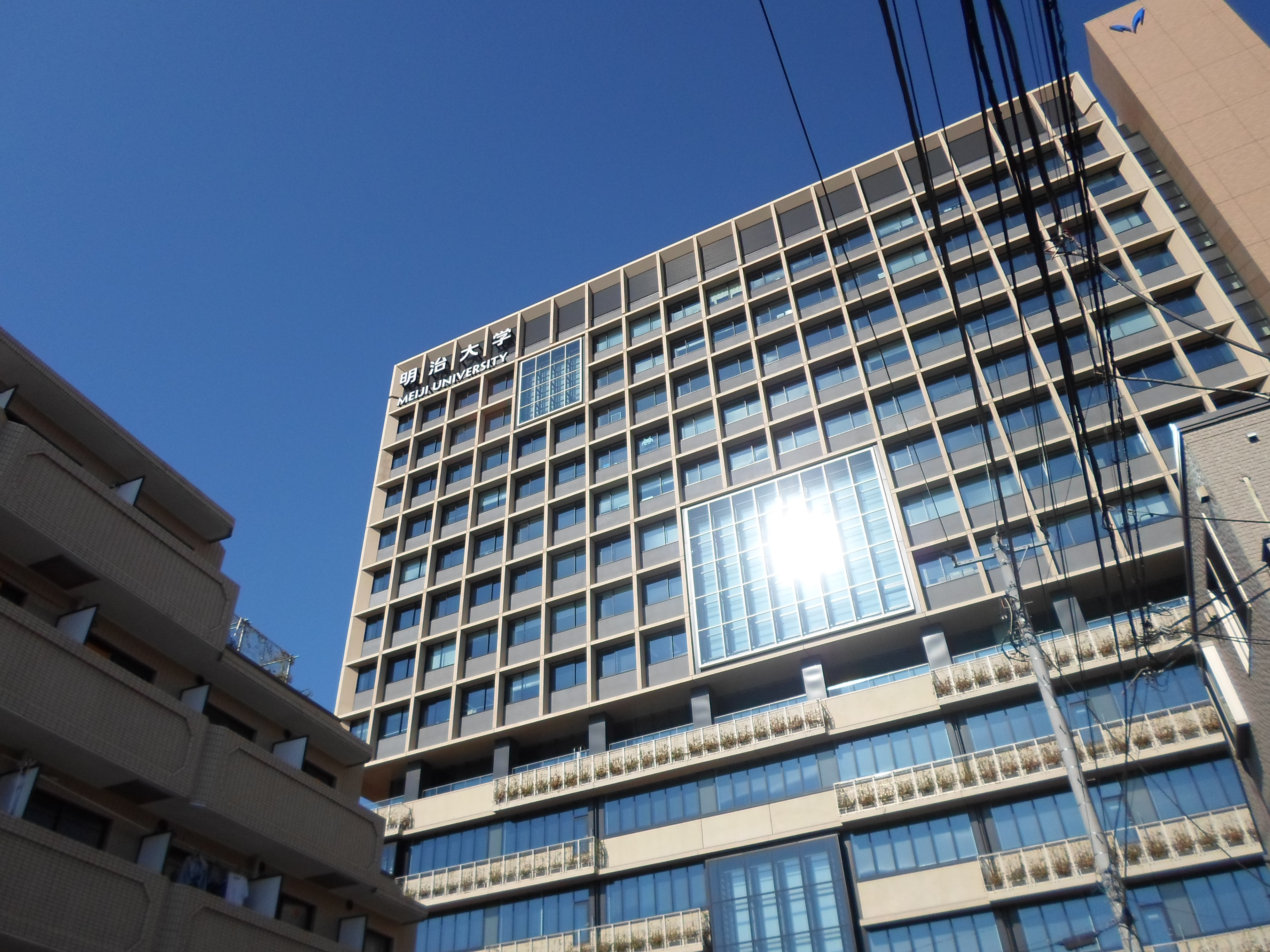 明治大学中野キャンパス